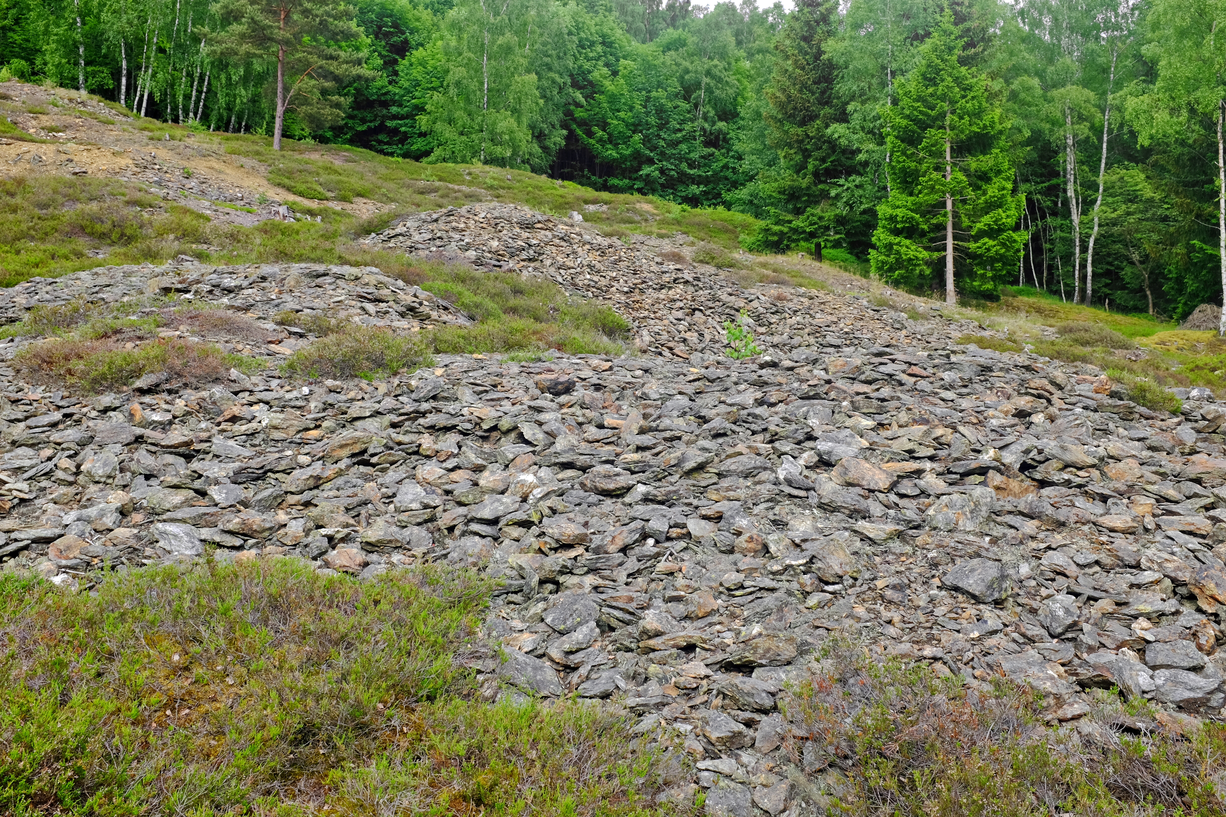 Evropsky významná lokalita Tisovec na jihozápadním svahu vrchu Tisovec, nad Tisovou, místní částí obce Kraslice, okres Sokolov